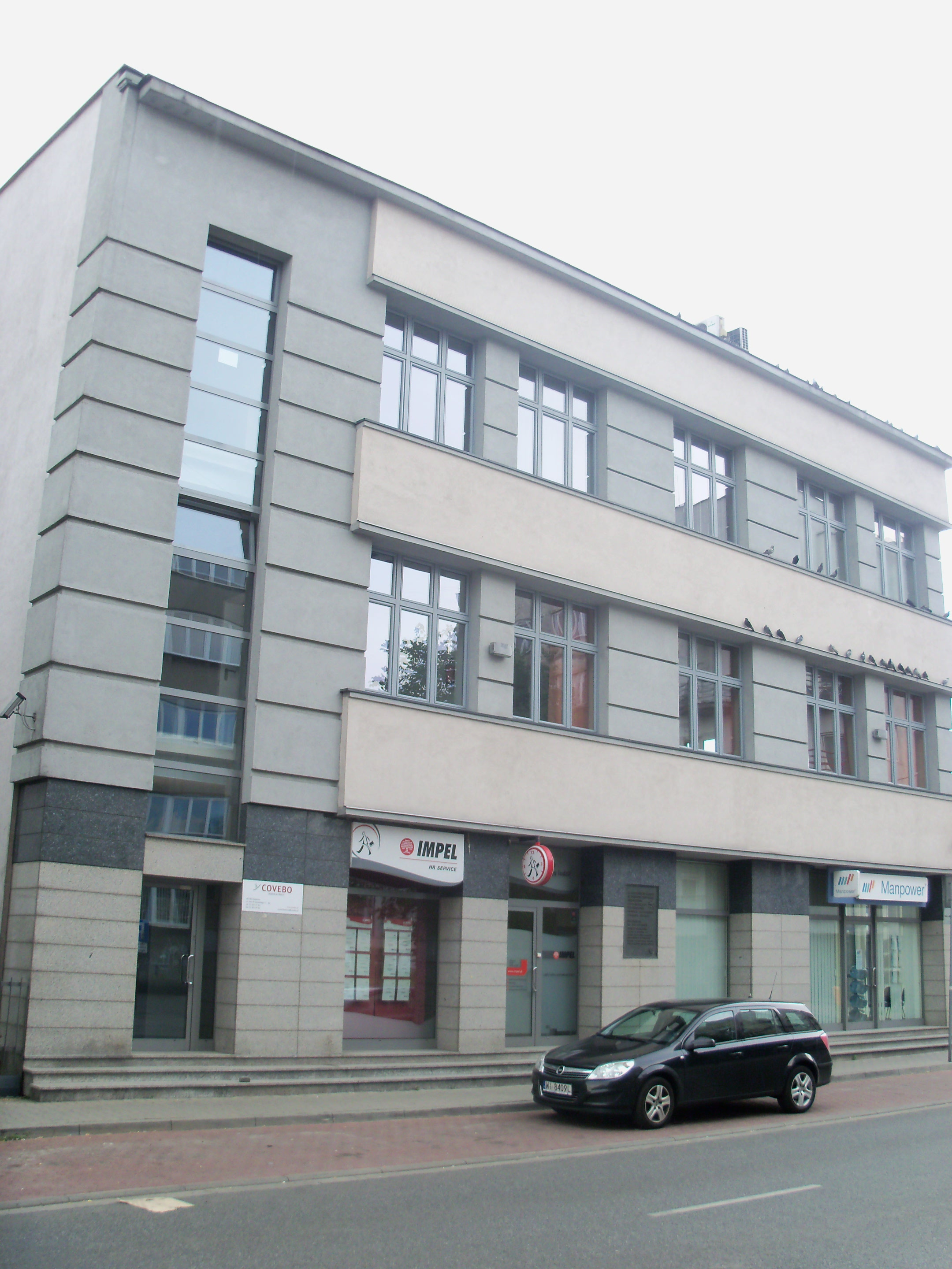 Budynek przy ul. Opolskiej 22 w Katowicach